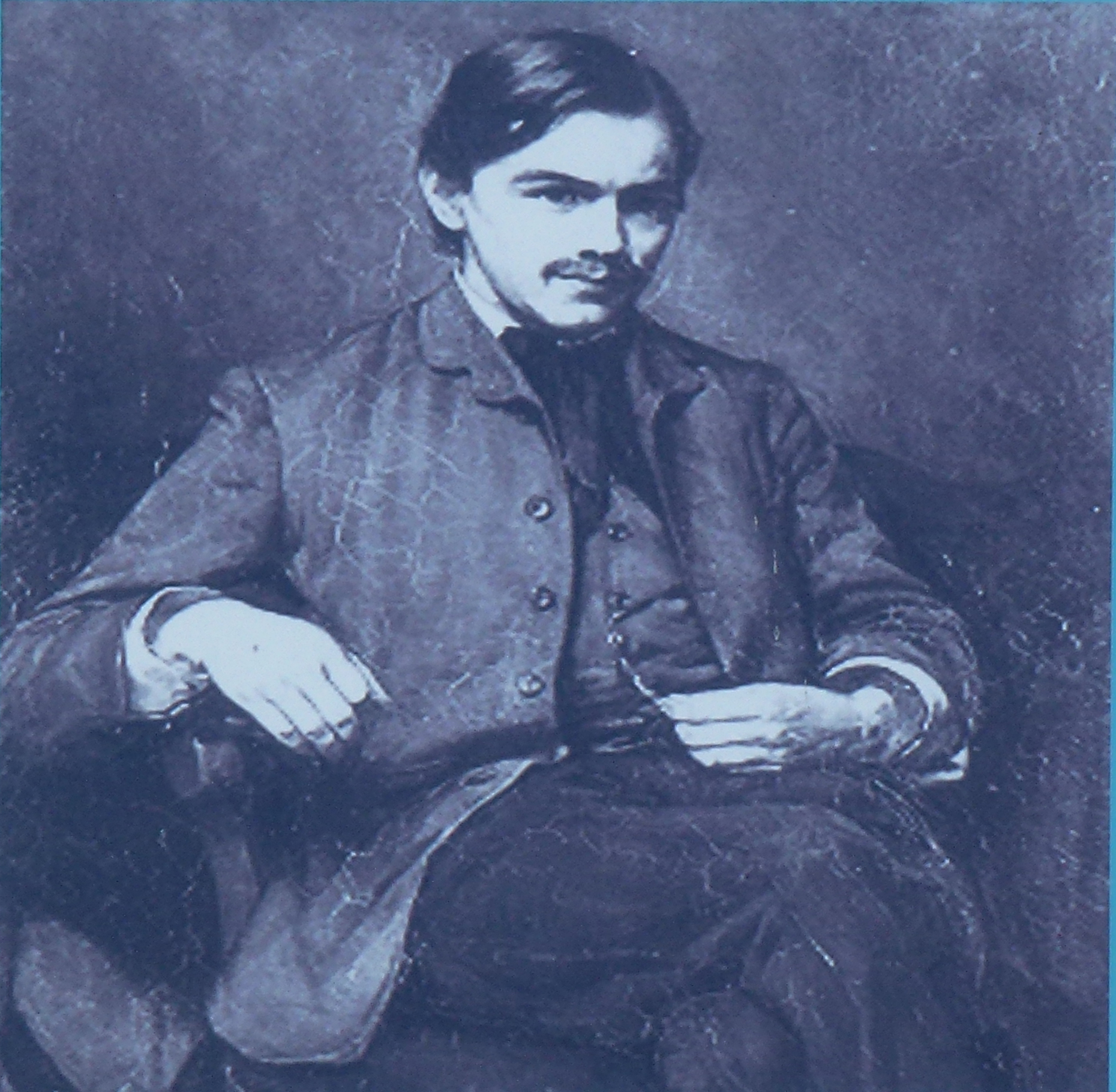 Frederik van Eden schrijver van o.a. De kleine Johannes. De foto is genomen op 2015-05-24 13:58:49